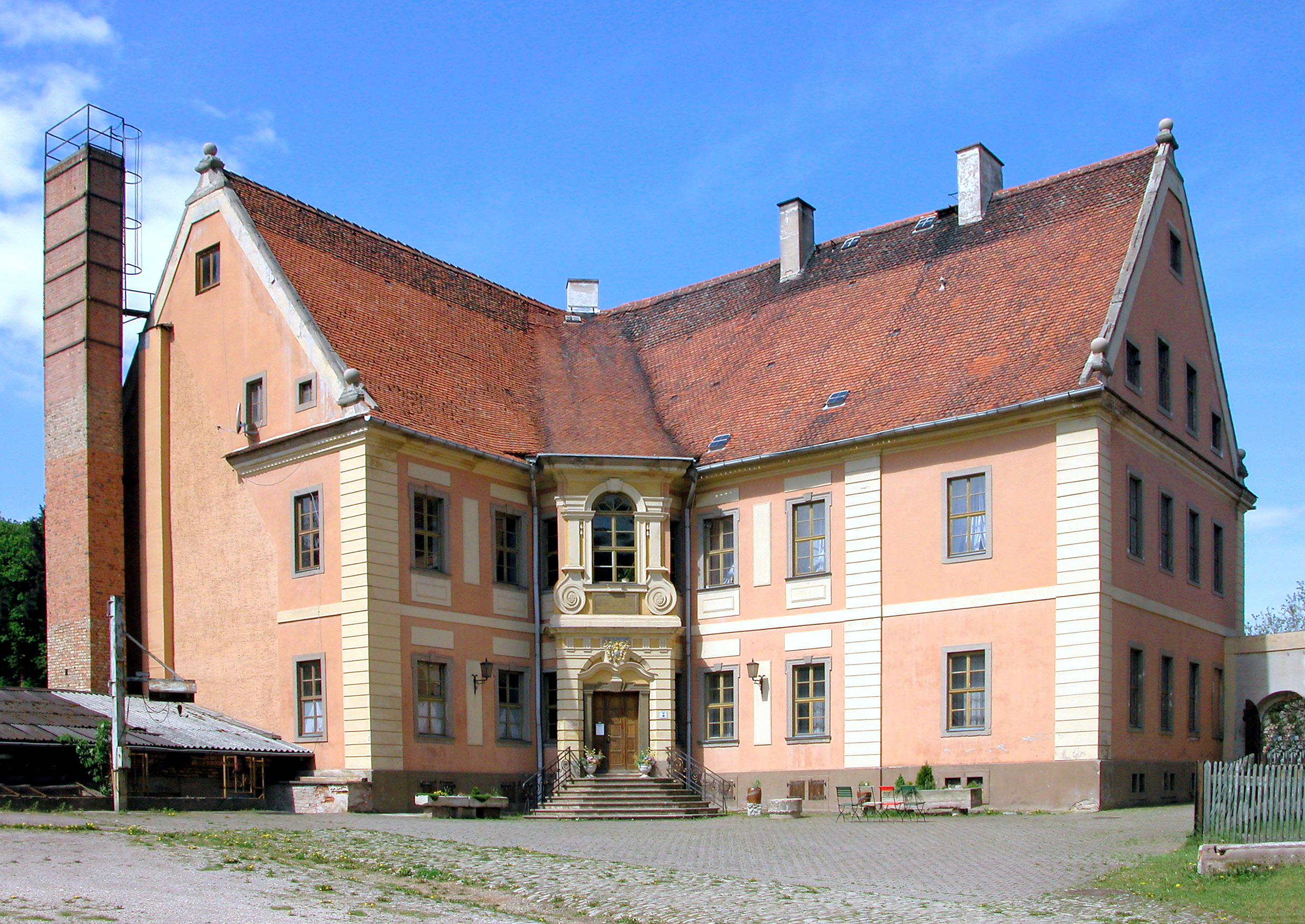 04.05.2004 06642 Bucha (Kaiserpfalz), Buchengrund 10 (GMP: 51.234770,11.509042): Barockschloß. Ursprüngliche eine im 12. Jahrhundert für den Grafen von Buch errichtete Burg. Georg August von Breitenbauch ließ diese abreißen und erbaute 1714 - 1718 das heute noch bestehende Schloß. Es befindet es sich wieder im Besitz der Familie Breitenbuch. Ansicht Hofseite. [DSCB3264.JPG]20040504020DR.JPG(c)Blobelt